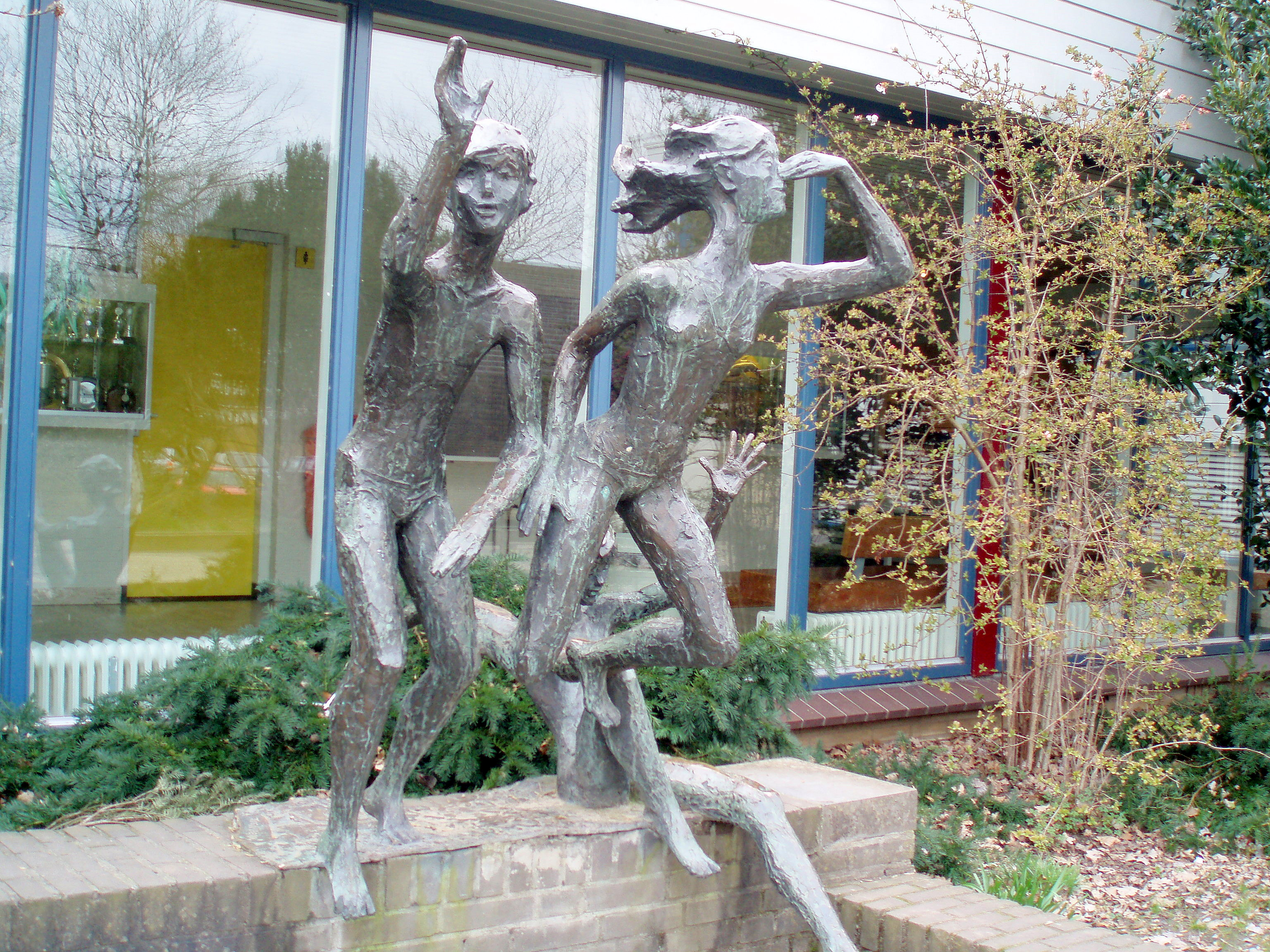 Kunstwerk bij het Aa-Bad in de Zwolse wijk Aa-landen. Gemaakt door Titus Leeser.